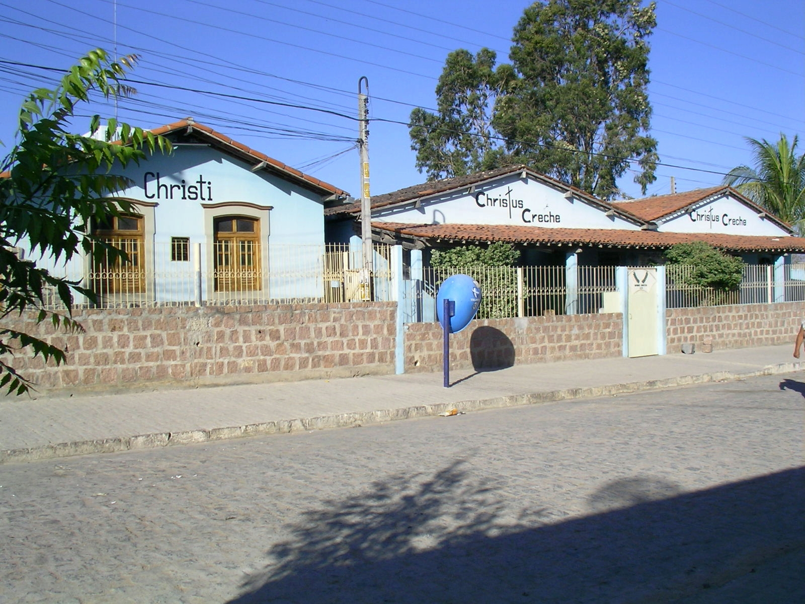 Die Gebäude der Fundação Terra in der Müllstraße in Arcoverde-PE